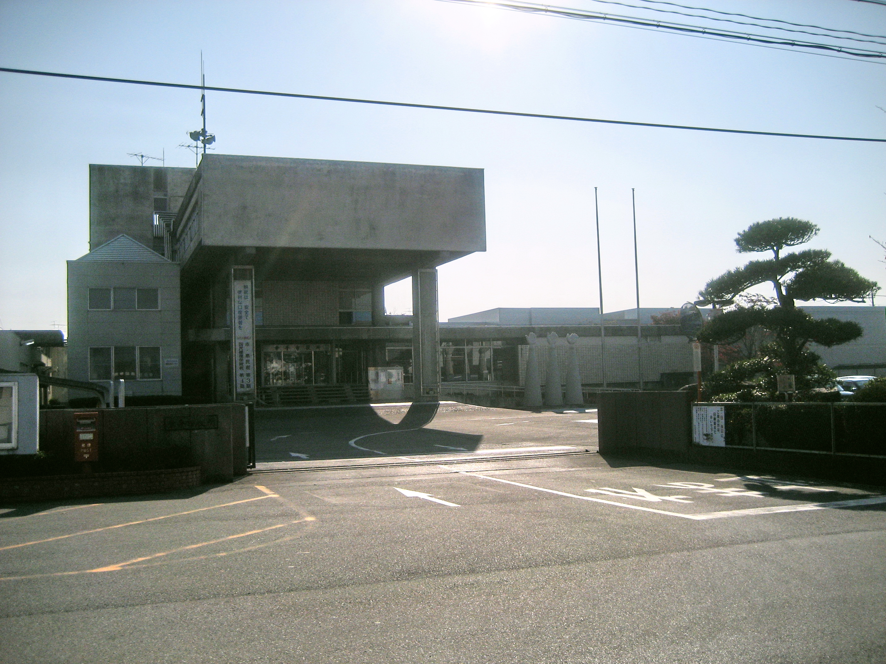 幸手市役所